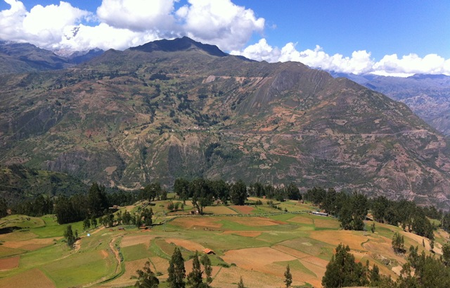 Panorama de Uchusquillo, sector Huari Era